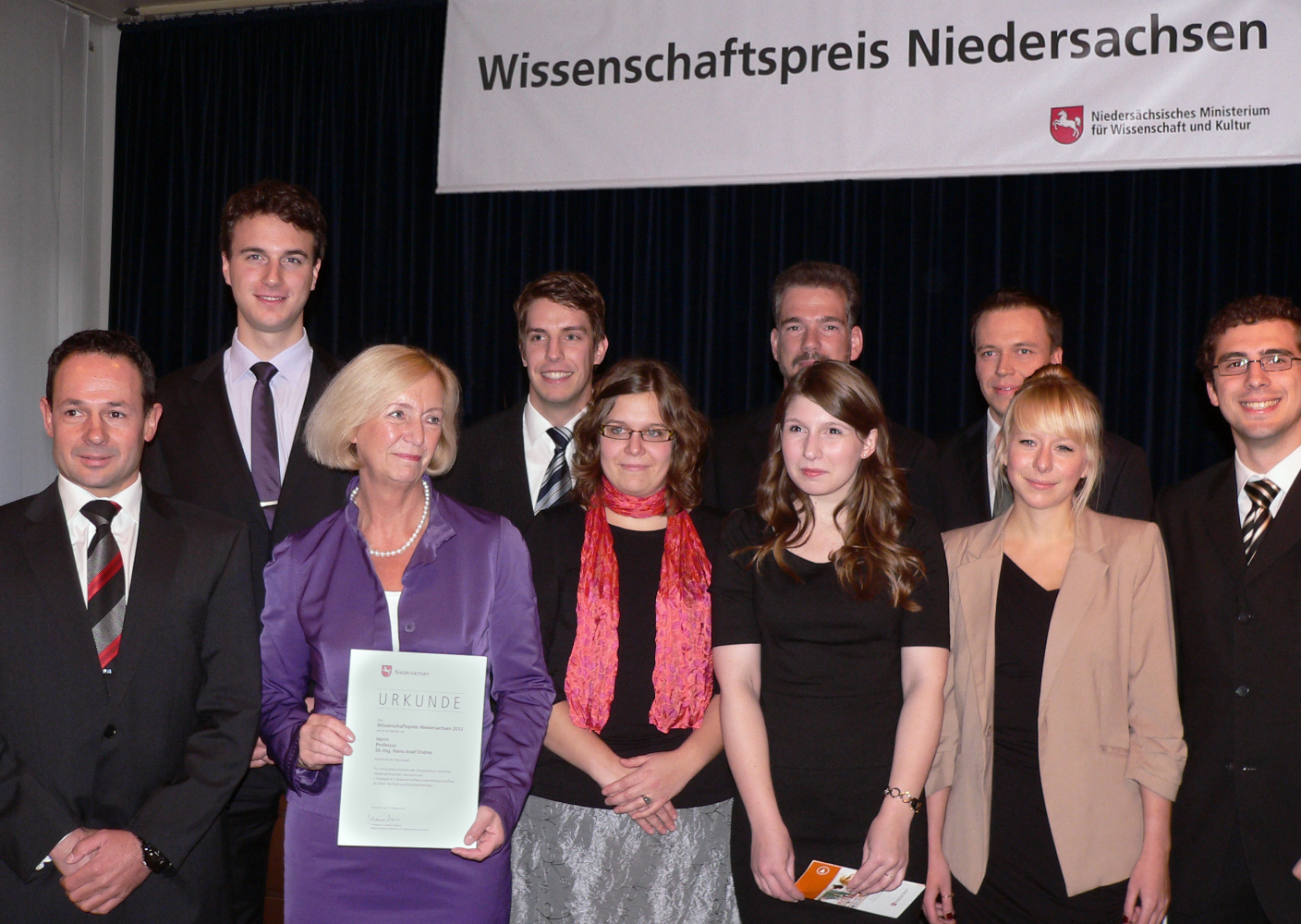 Preisträger des Wissenschaftspreises Niedersachsen 2012, von links nach rechts: Hans-Josef Endres (Hochschule Hannover), Sören Brandenburg (Studierender Georg-August-Universität Göttingen), Ministerin Johanna Wanka, Sebastian Decker (Studierender Carl von Ossietzky Universität Oldenburg), Siri Rackebrandt (Studierende Carl von Ossietzky Universität Oldenburg),Annika Weinert (Studierende Leuphana Universität Lüneburg), Marcus A. Magnor (TU Braunschweig), Viacheslav Nikolaev (Georg-August-Universität Göttingen), Nikola Christine Müller (Studierende Georg-August-Universität Göttingen), Philip Willke (Studierender Georg-August-Universität Göttingen)